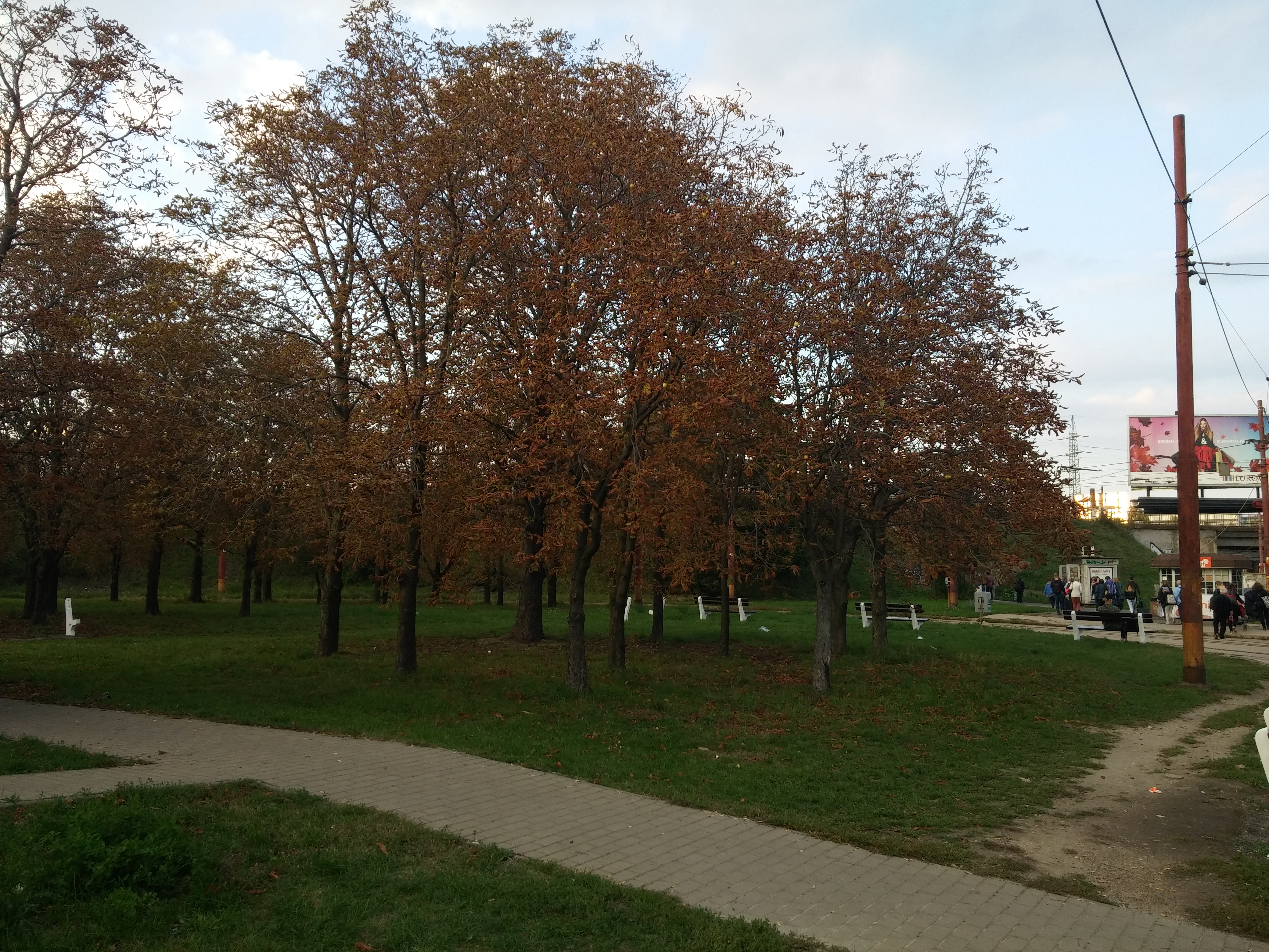 Gaštanový hájik, Nové Mesto, Bratislava